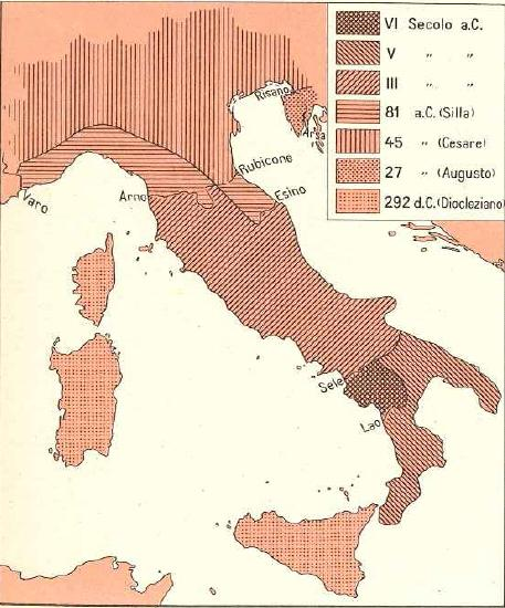 Progressivoestendersi del territorio denominato "Italia"